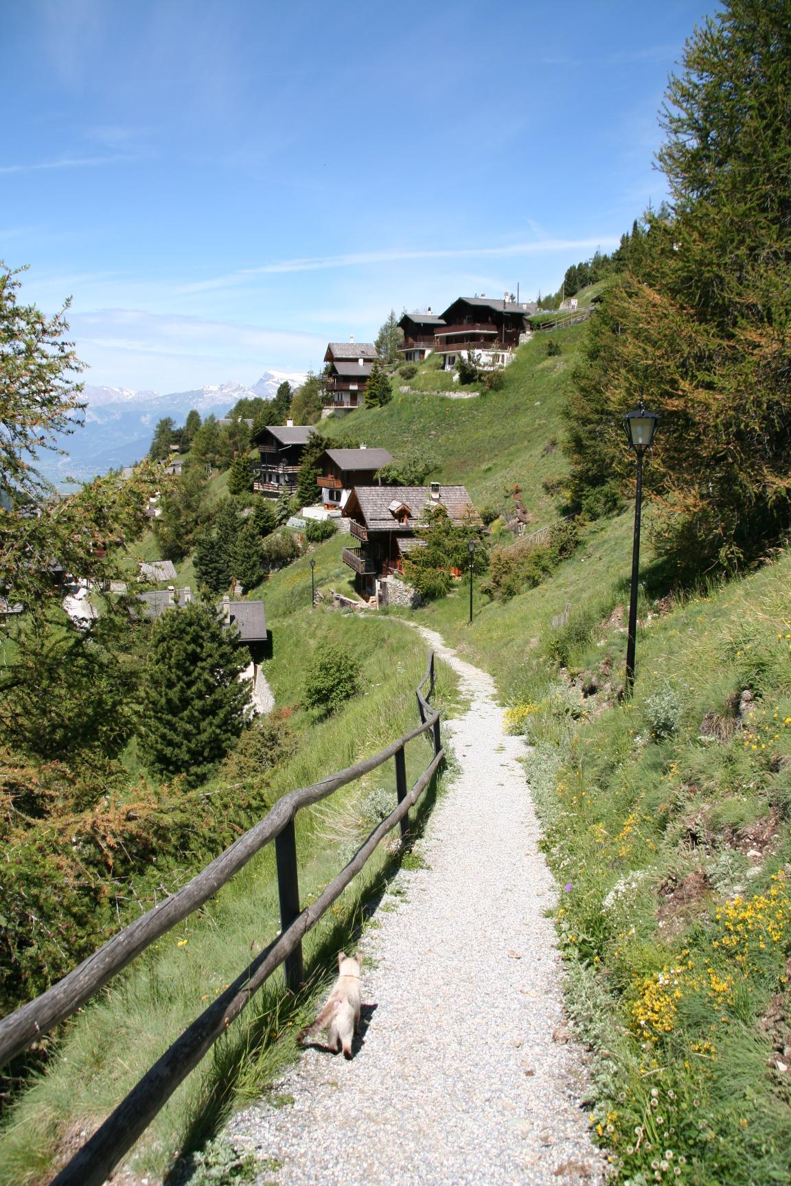 Chandolin (Valais/Suisse) en juin 2007